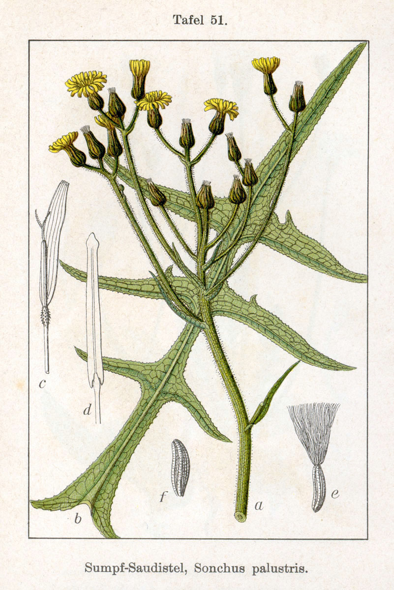 Sonchus palustris L. Original Description Sumpf-Saudistel, Sonchus palustris